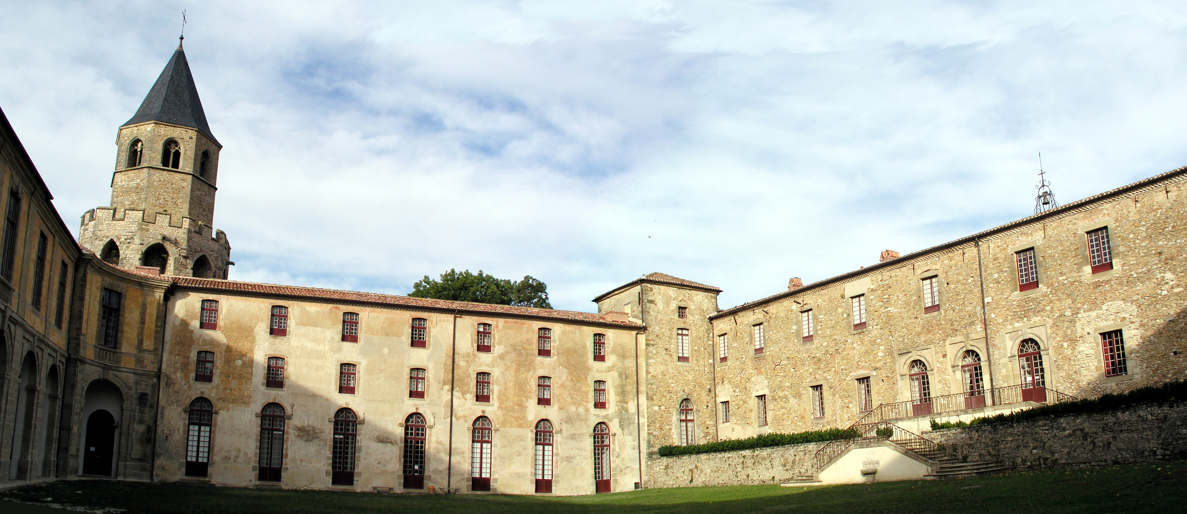 Le clocher Saint Martin et la cour des Rouges de l'abbaye-école de Sorèze.